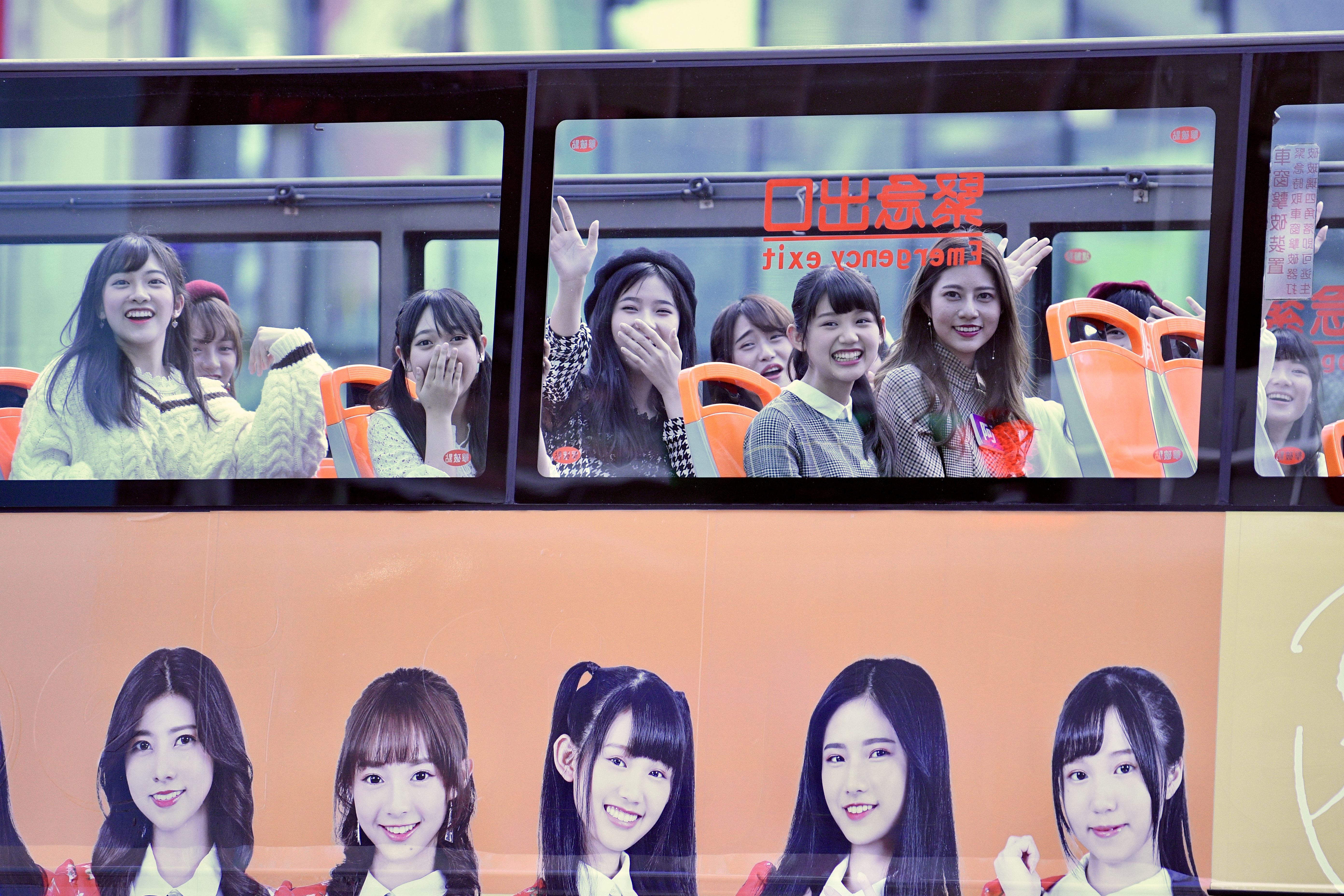 2018.01.04 AKB48 Team TP 1st「勇往直前」專屬雙層觀光巴士亮相&快閃見面活動@西門町捷運6號出口前廣場